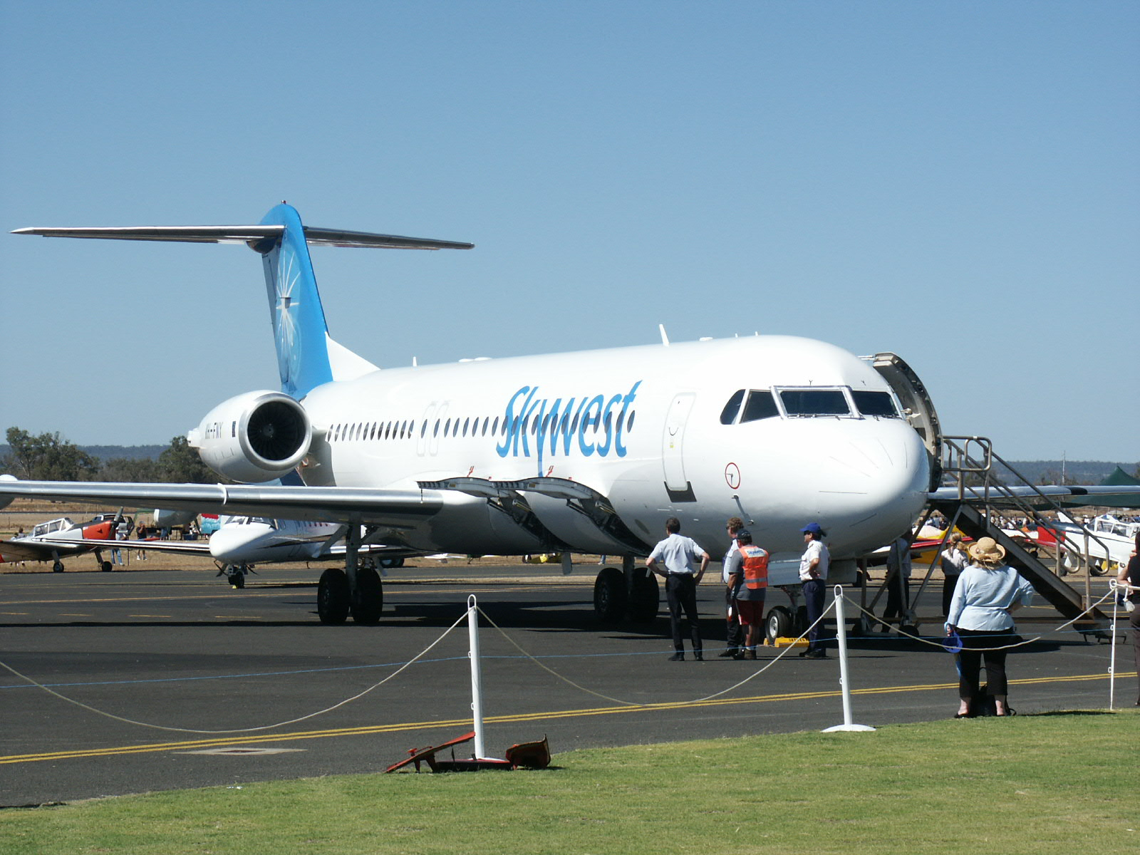 Skywest Fokker F100 VH-FNY at Busselton, Western Australia.